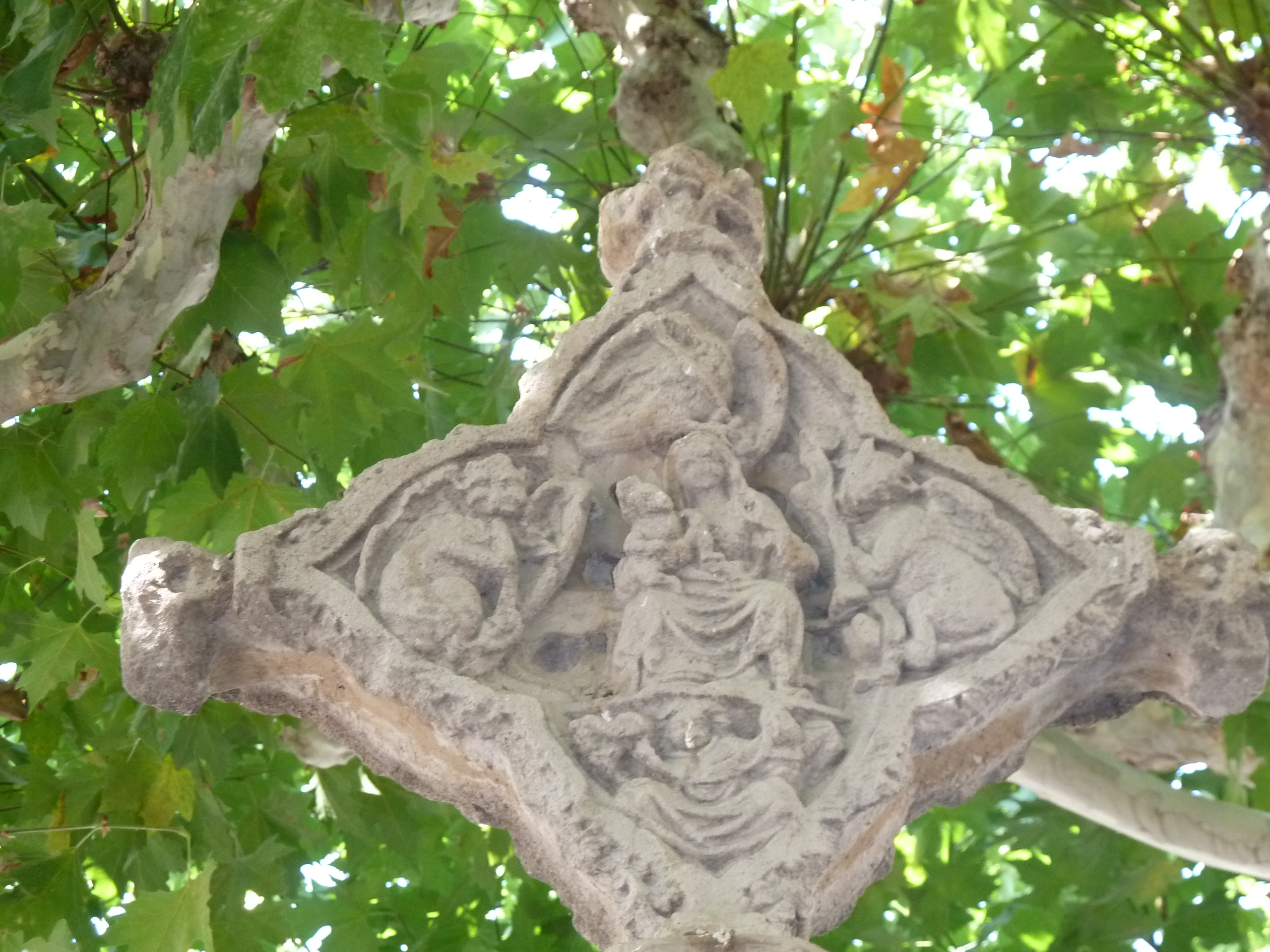 Balaguer